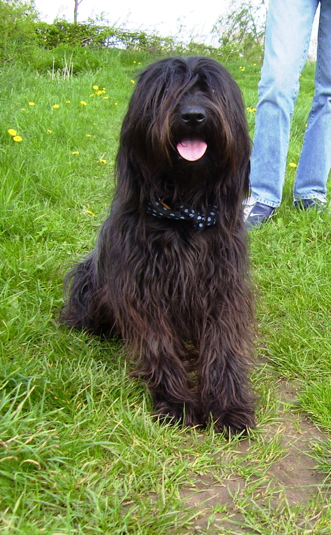 Foto van onze Catalaanse herder, zelf gemaakt en ter beschikking gesteld aan Wikipedia-gebuikers